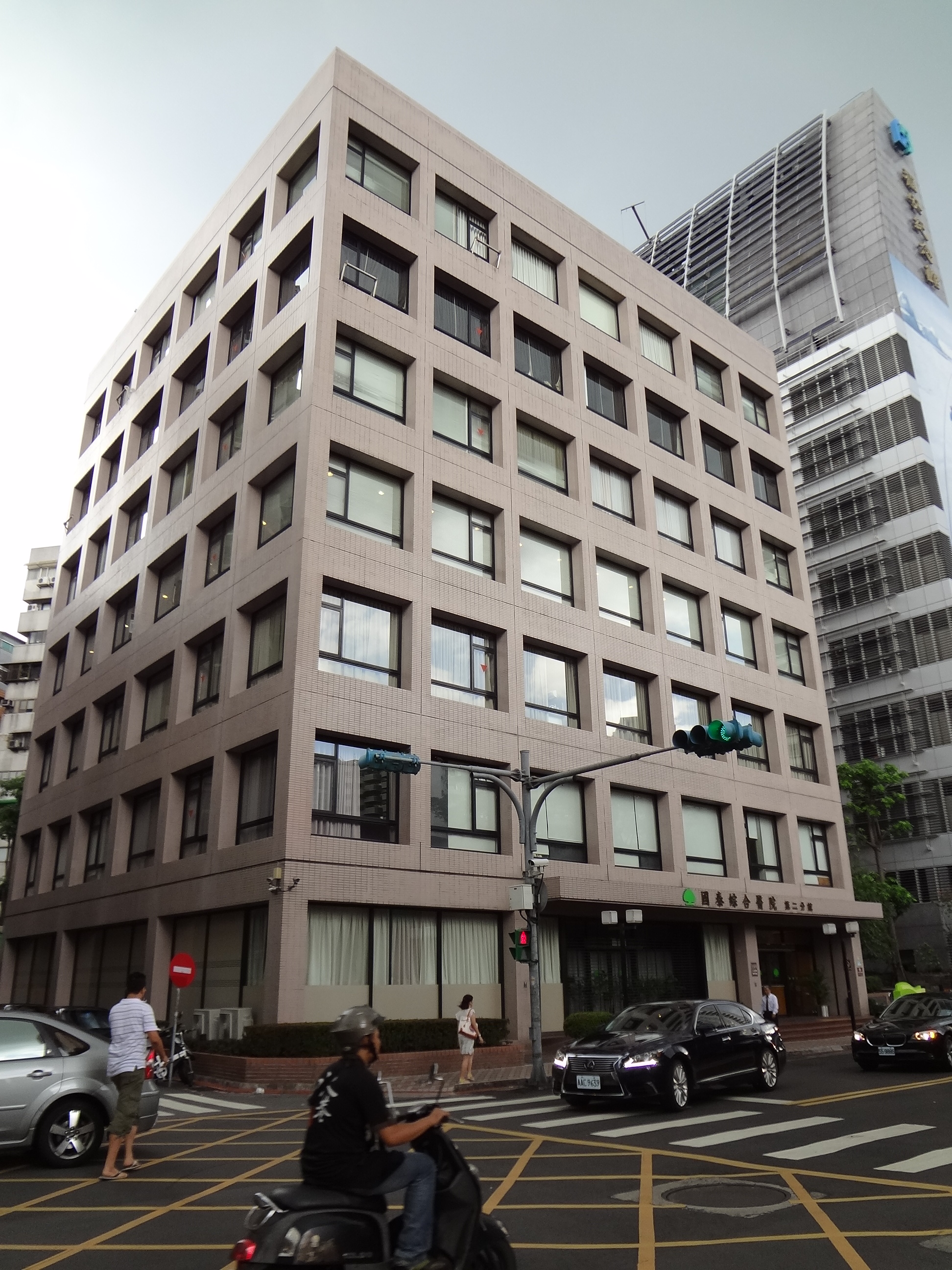 中文（台灣）: 國泰綜合醫院總院第二分館，位於臺北市大安區仁愛路四段266巷6號。